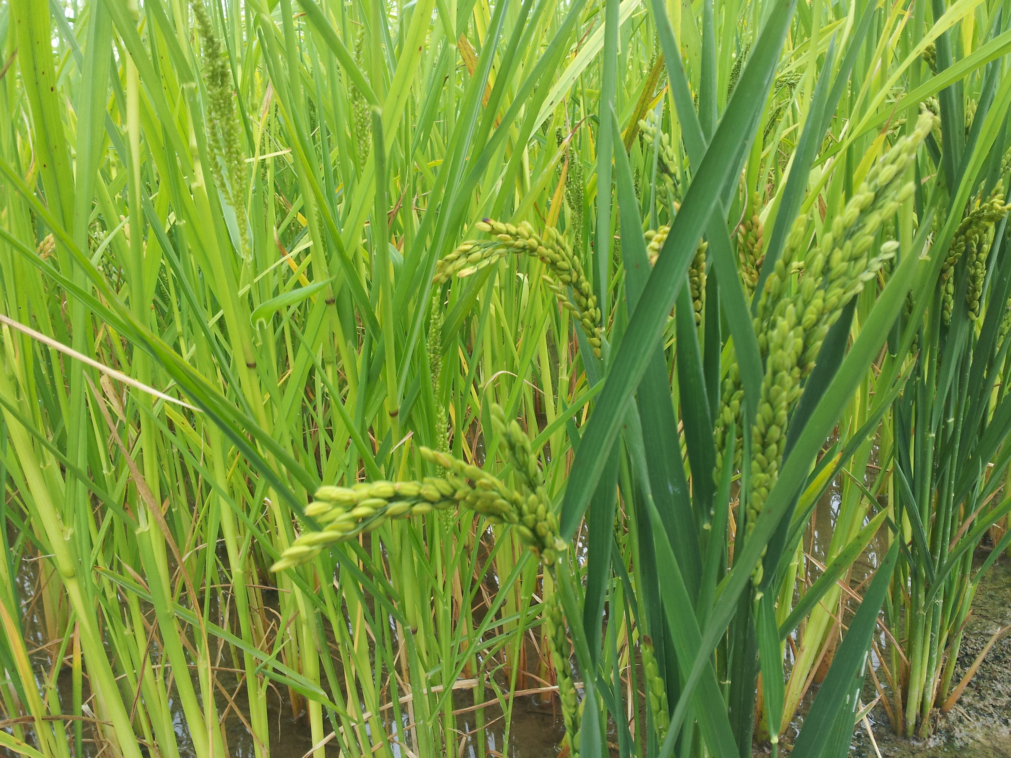 Arròs Bomba a un camp de la marjal de Sollana.